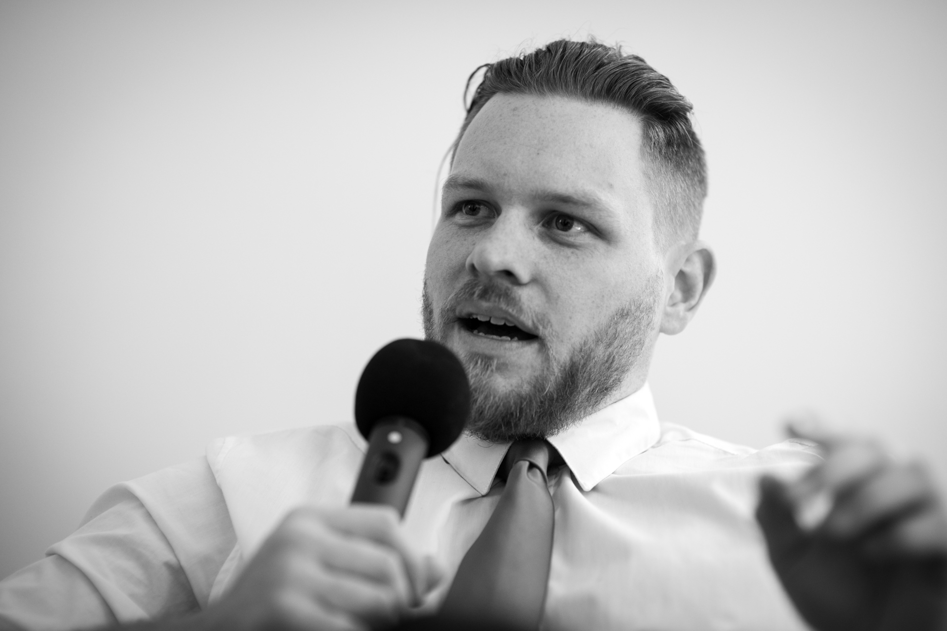 Джок Полфрийман по време на интервю за подкаста Говори ѝнтернет.